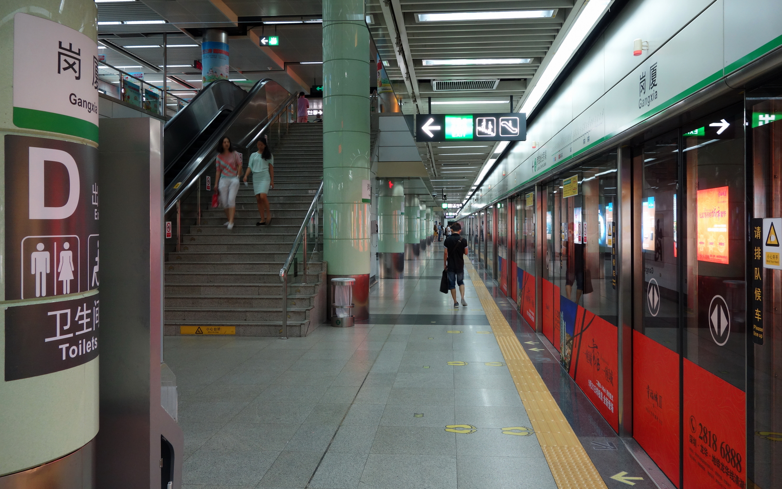 罗宝线岗厦车站站台